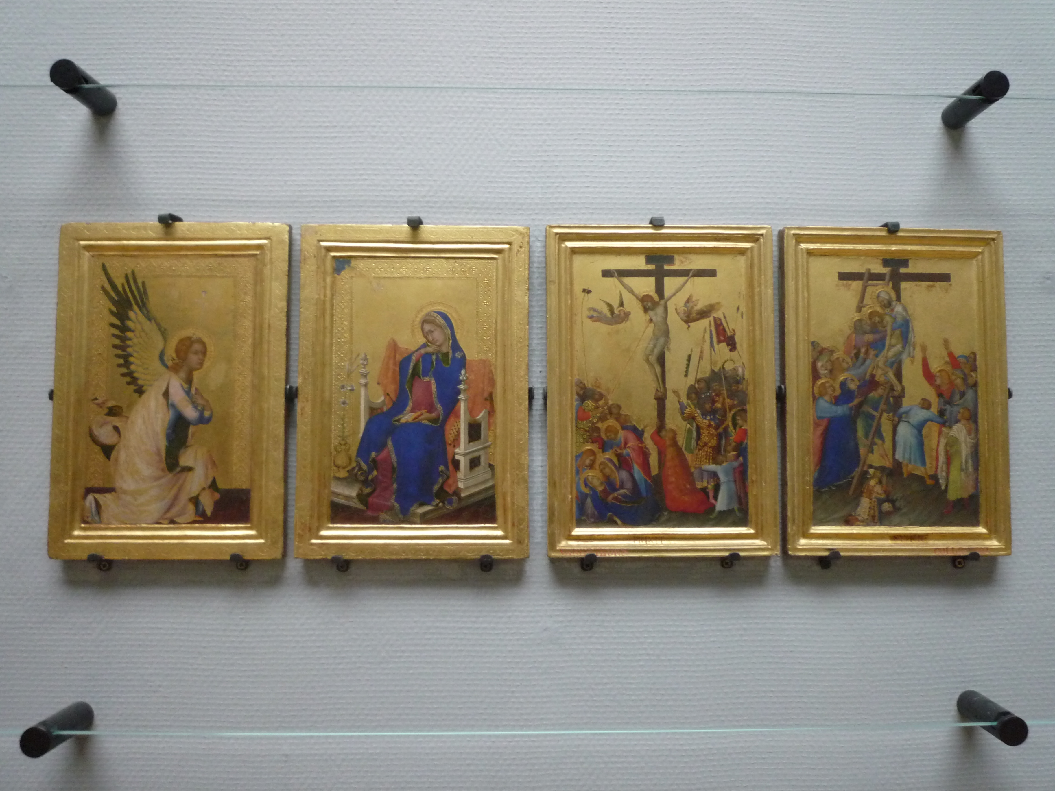 Polyptyque (Annonciation, Crucifixion, Déposition) conservé au Musée des Beaux-arts d'Anvers (Belgique)